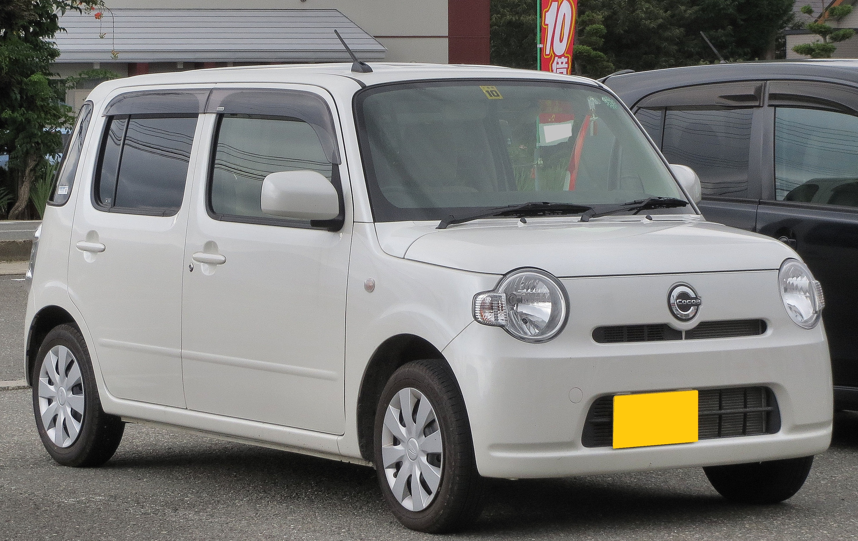 ダイハツ ミラココア L 後期型